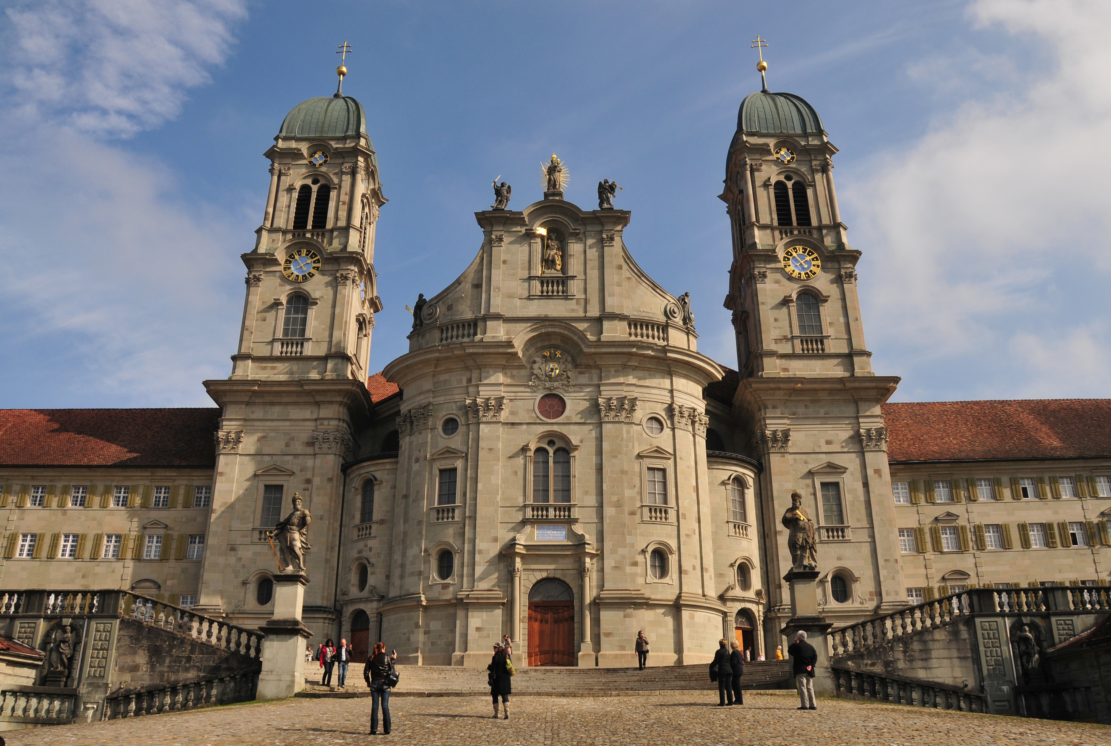 Kloster Einsiedeln, Frontansicht, Herbst 2008